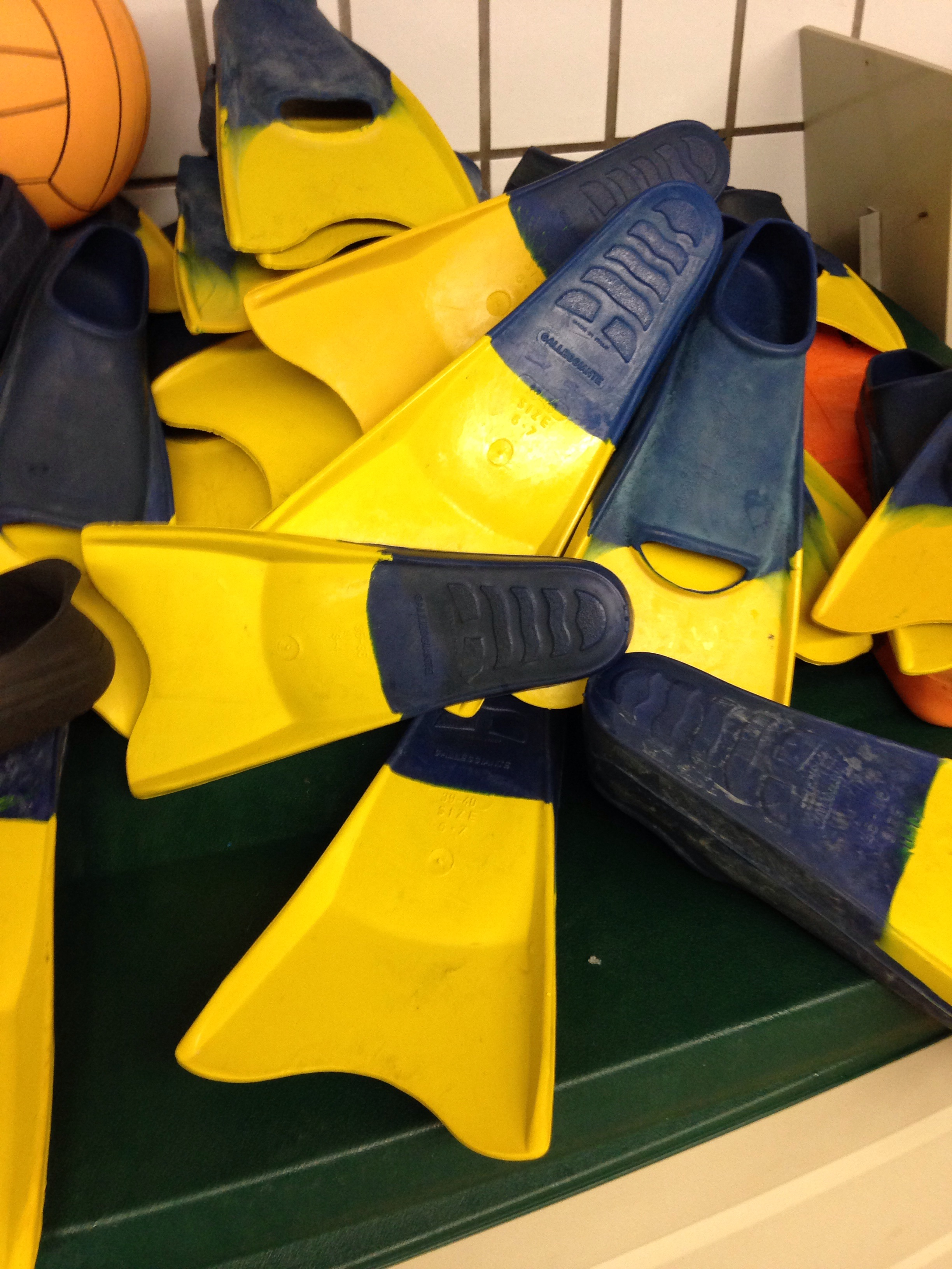 Schwimmflossen